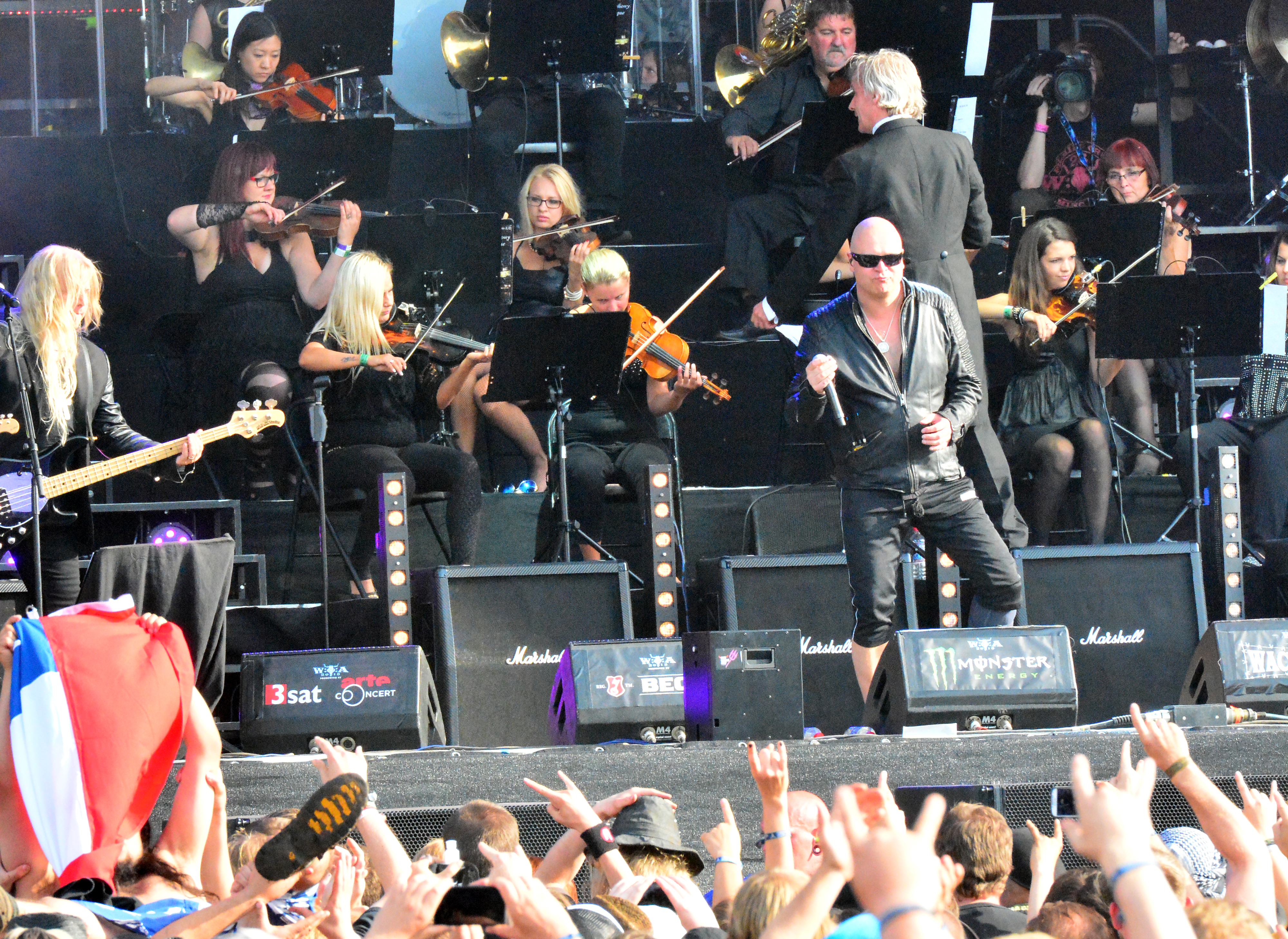 Rock meets classic mit Michael Kiske beim Wacken Open Air 2015